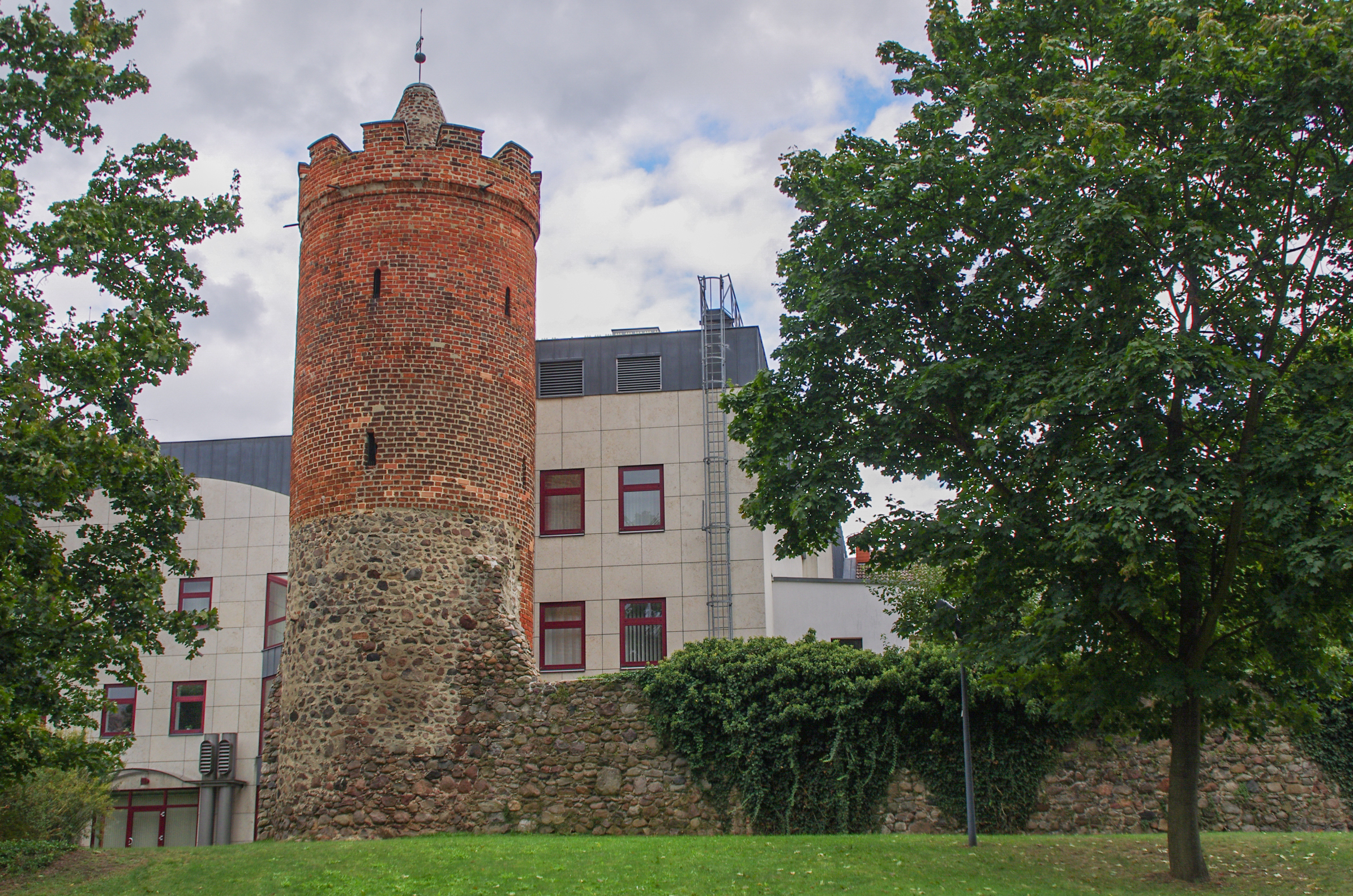 Fürstenwalde in Brandenburg. Der Bullenturm am Gotheplatz ist ein Teil der Stadtmauer aus dem 14./15. Jahrhundert.